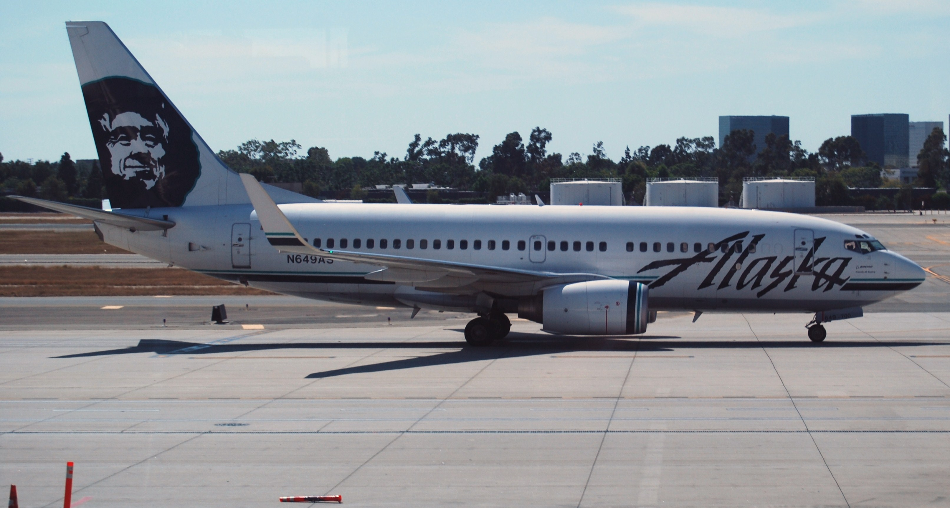 ALASKA 737-700